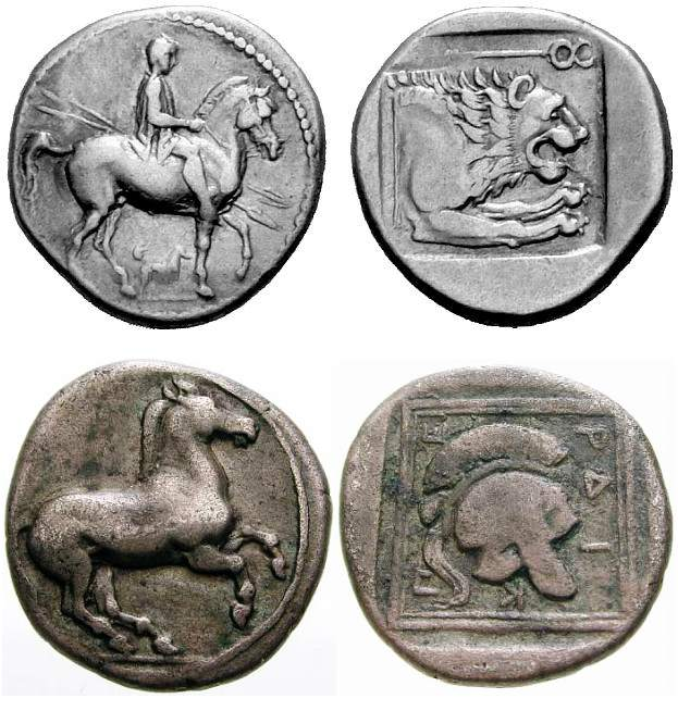 Тетробол (монета в 4 обола) Пердикки II, царя Македонии во 2-й половине V в. до н. э. Вес македонских тетраболов от 1.8 до 2.2 г серебра